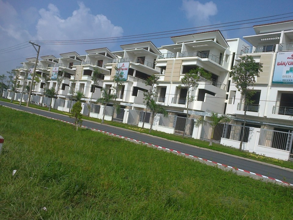 Khu Đô thị tạo Thành phố Tân An, Long An